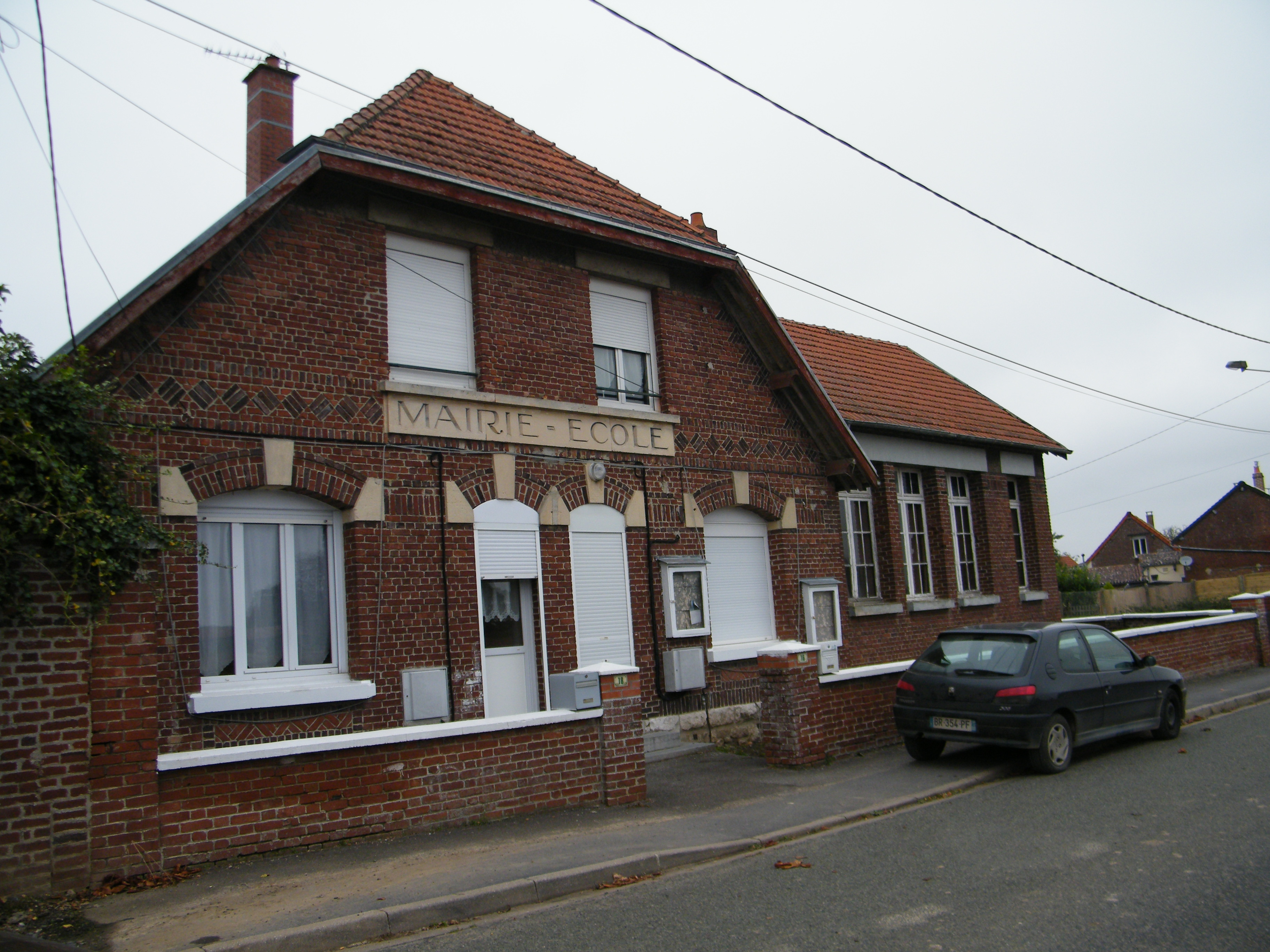 Bâtiments communaux : mairie-école.